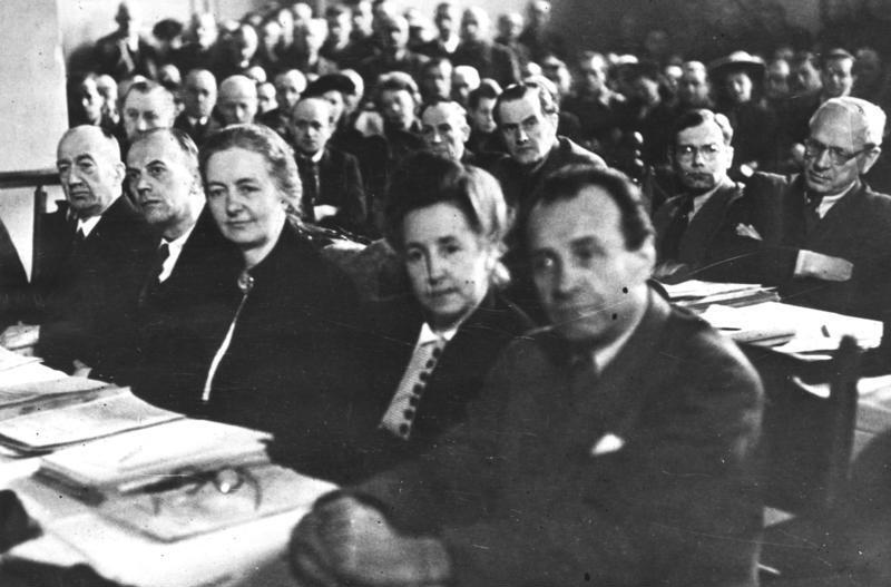 Zum ersten Mal Frauen im Wirtschaftsrat. Zum ersten Mal nahmen auch weibliche Mitglieder an den Sitzungen des Wirtschaftsrates teil. Beide Frauen gehören der SPD-Fraktion an. Unser Bild zeigt links die Sekretärin Frau Anni Krahnstöver, Eckernförde, Schleswig-Holstein, Mitglied des Flüchtlingsausschusses der britischen Zone und die Hausfrau Frau Lisa Korspeter, Hannover. 4-3-48 Illus-dpd